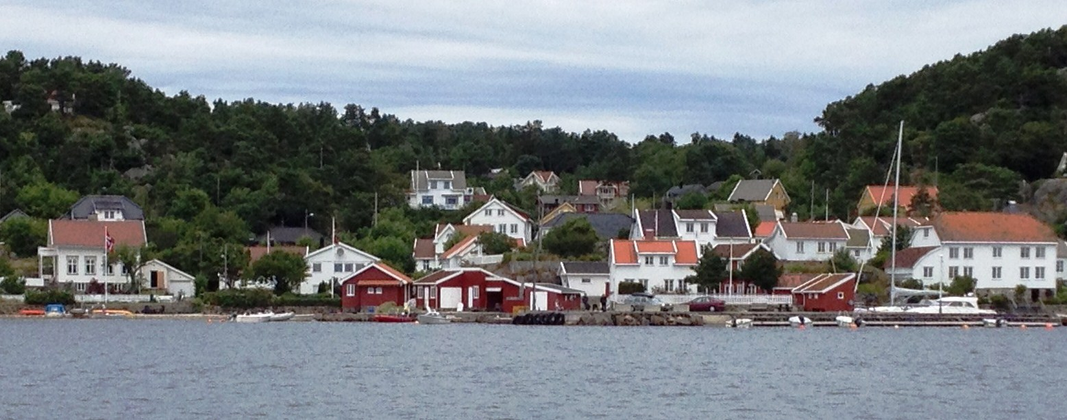 revesand, med kaia til rutebåten omtrent midt i bildet